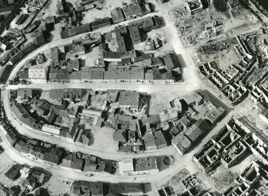 Беларуская (тарашкевіца): Менск (Miensk), Замчышча (Zamčyšča). Аэрафотаздымак